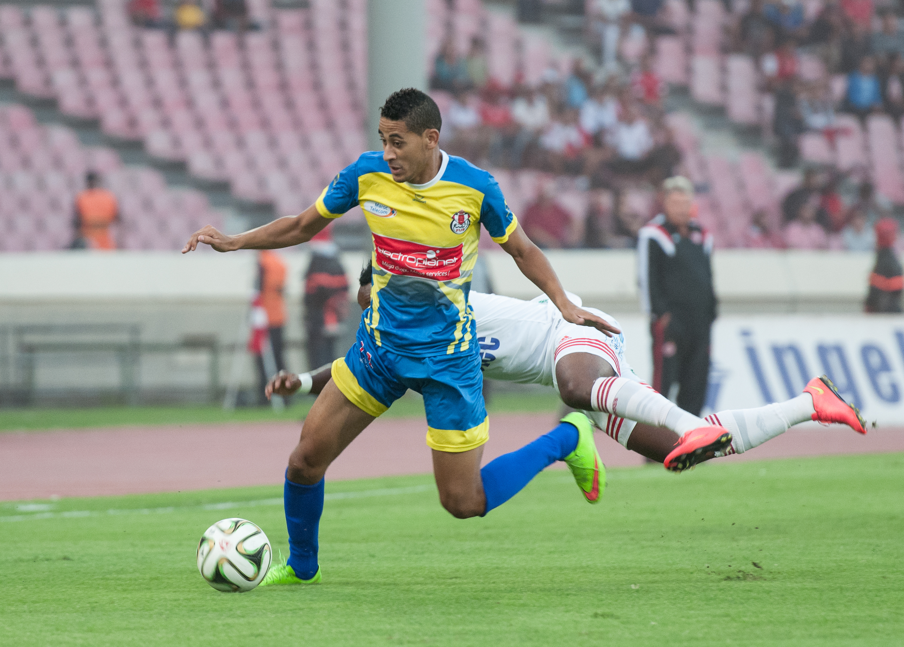 Match du WA Casablanca contre le FUS de Rabat le 27 septembre 2014 au stade Mohammed-V